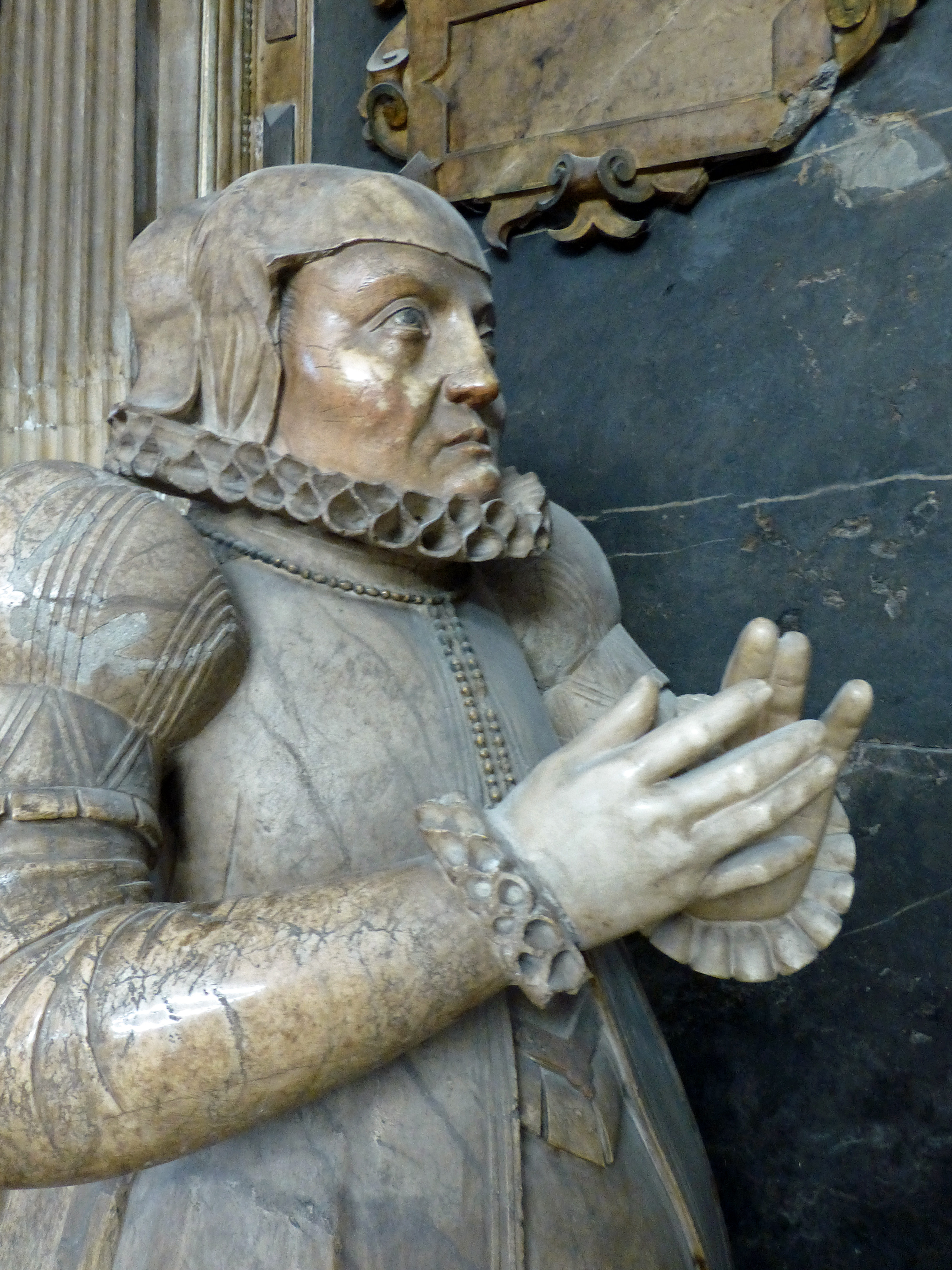 Weimar, Stadtkirche St. Peter und Paul (Herderkirche) : Epitaph der Herzogin Dorothea Susanna, geb. Pfalzgräfin bei Rhein (1544-1592)